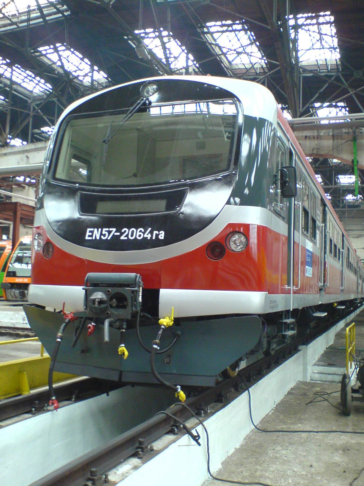 EN 57-2064